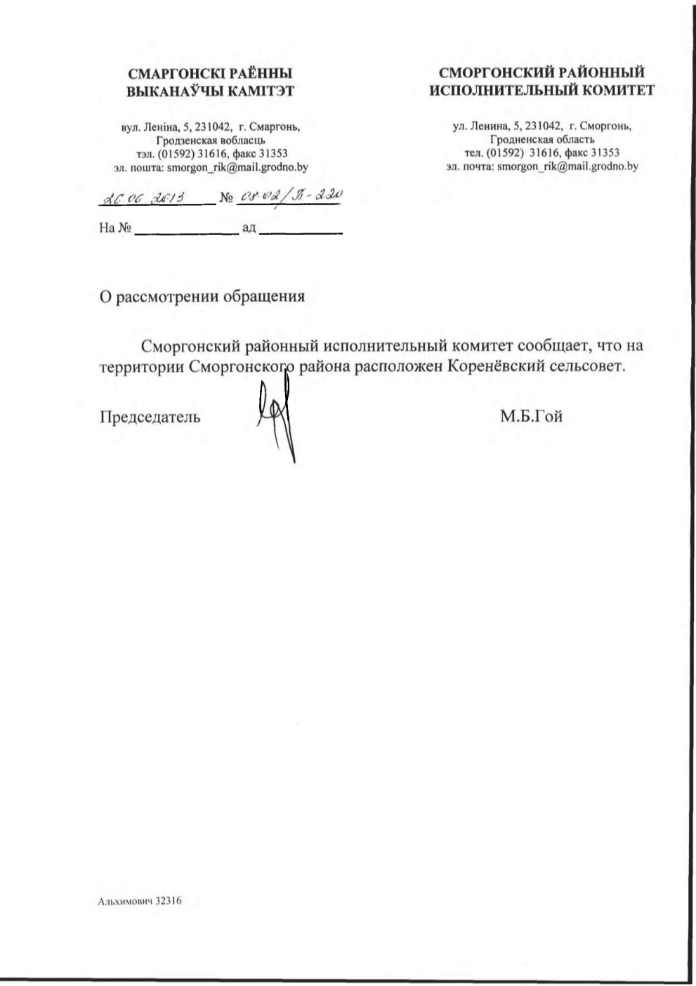 Официальный ответ на запрос о присутствии буквы ё в названии